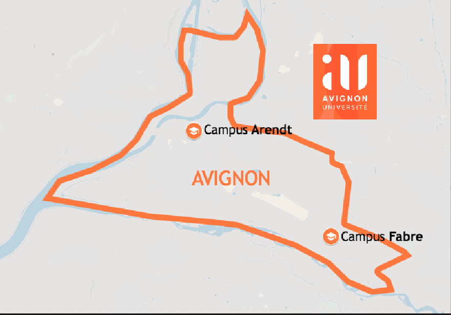 Plan des Campus d'Avignon Université